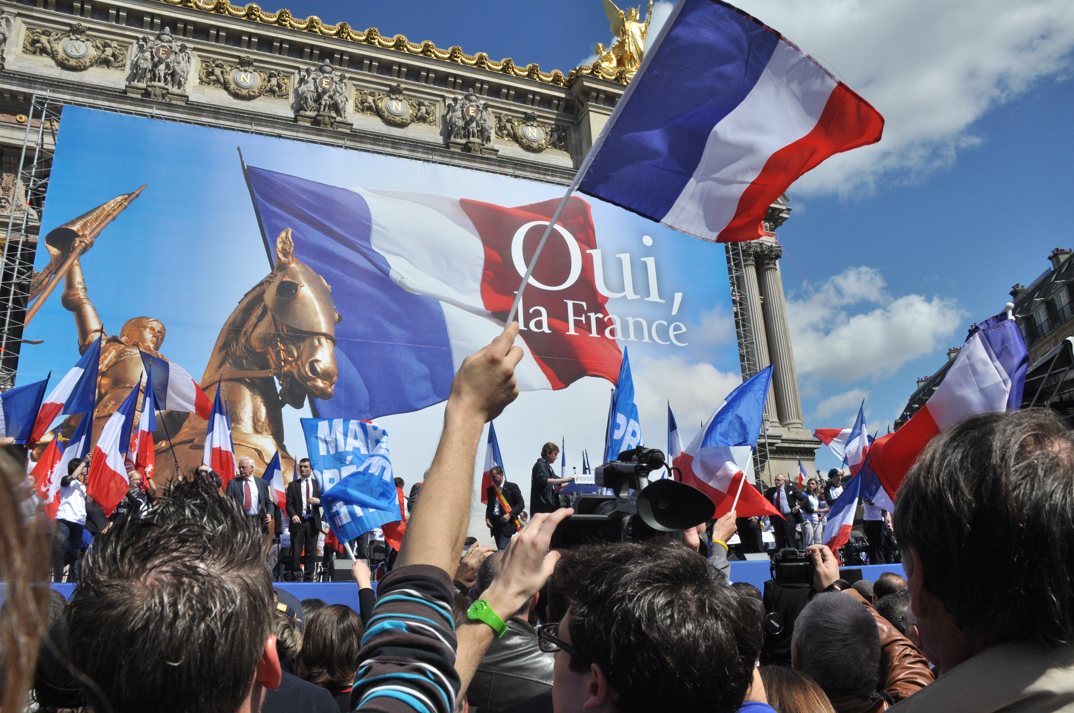 Le 1er mai 2012, comme chaque année, les militants du Front National ont défilé dans Paris et se sont retrouvés devant l'Opéra Garnier pour un meeting. Jean-Marie Le Pen et Marine Le Pen y ont prononcé chacun un discours, en pleine campagne de l'entre-deux tours de la présidentielle. Parmi les attentes, une consigne de vote de la part de la présidente du FN, qui n'en a pas donnée et a annoncé voter blanc à titre personnel.